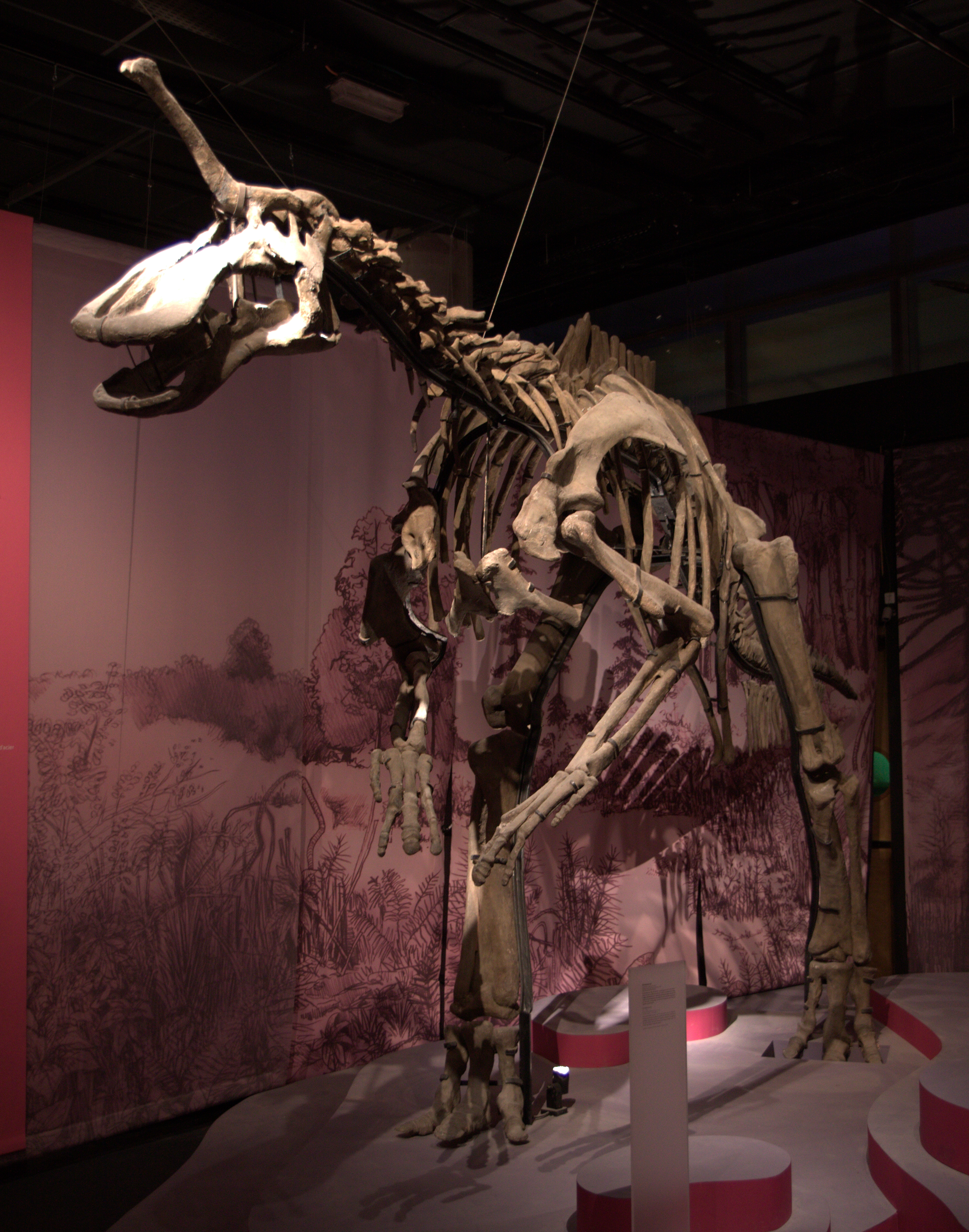 Daté entre 83 et 71 millions d'années, ce squelette incomplet a été découvert en Chine dans la province du Shandong. The making of this document was supported by Wikimédia France. (Submit your project!)